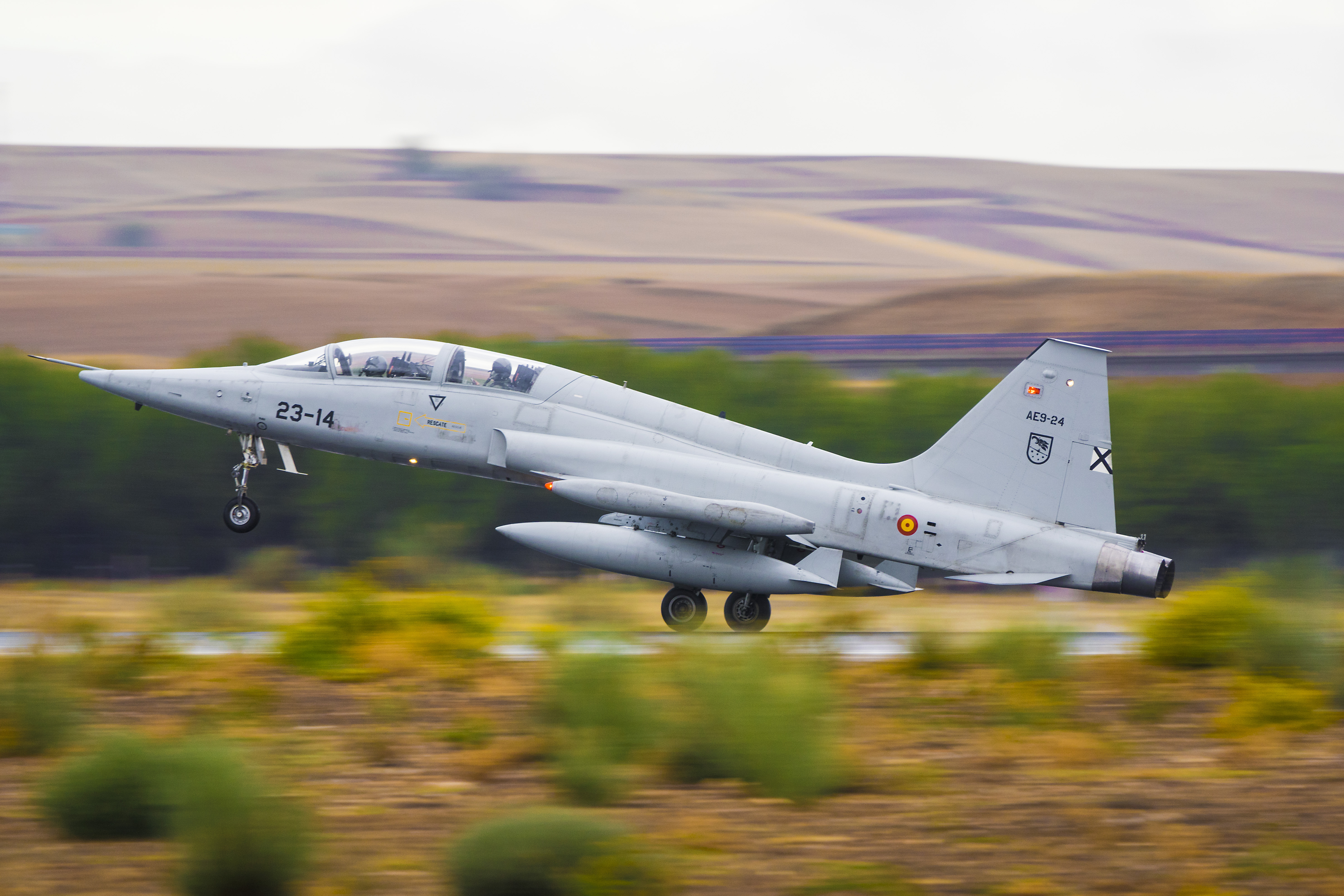 Aire75 Airshow 75 aniversario del Ejercito del Aire